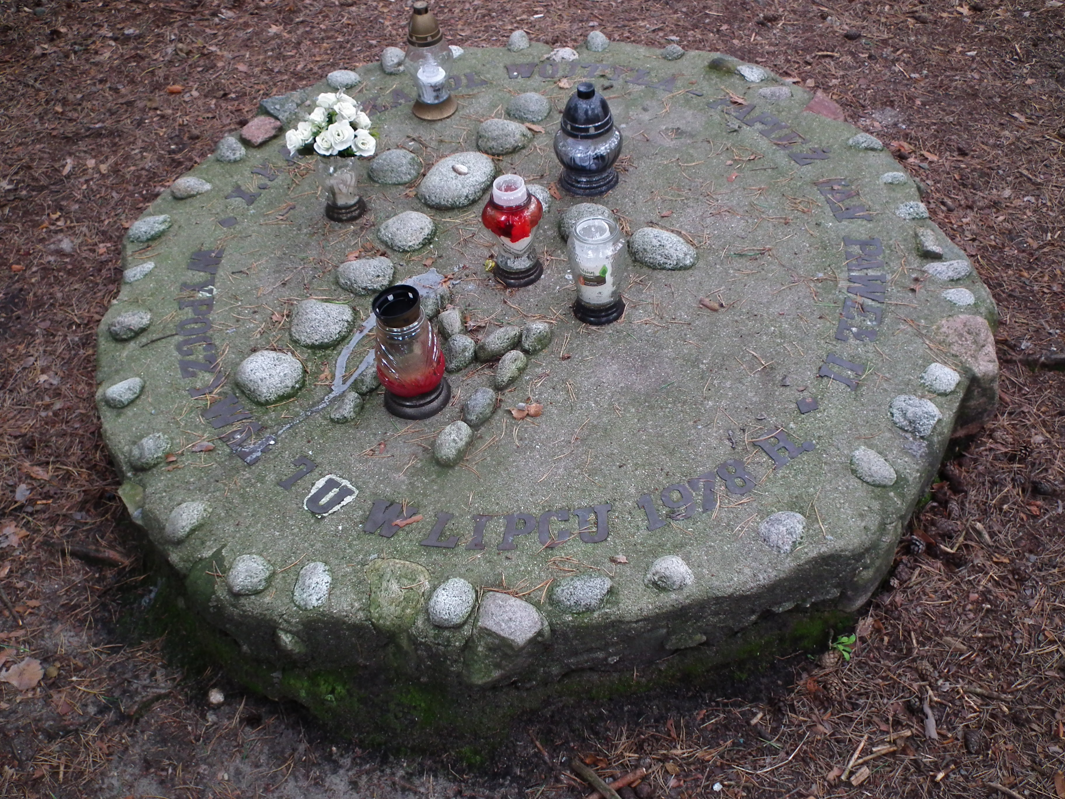 Pomnik Jana Pawła II w Czechyniu - prawdopodobnie pierwszy na świecie - wzniesiony 12 VIII 1979 r.